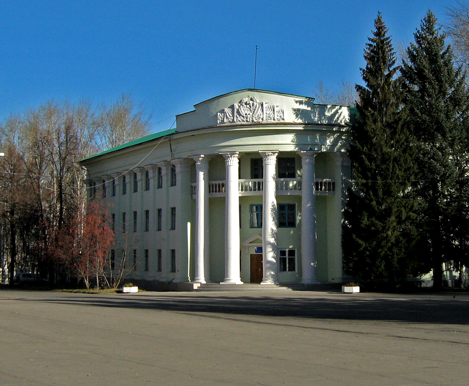 Здание городской школы искусств в городе Жигулёвске